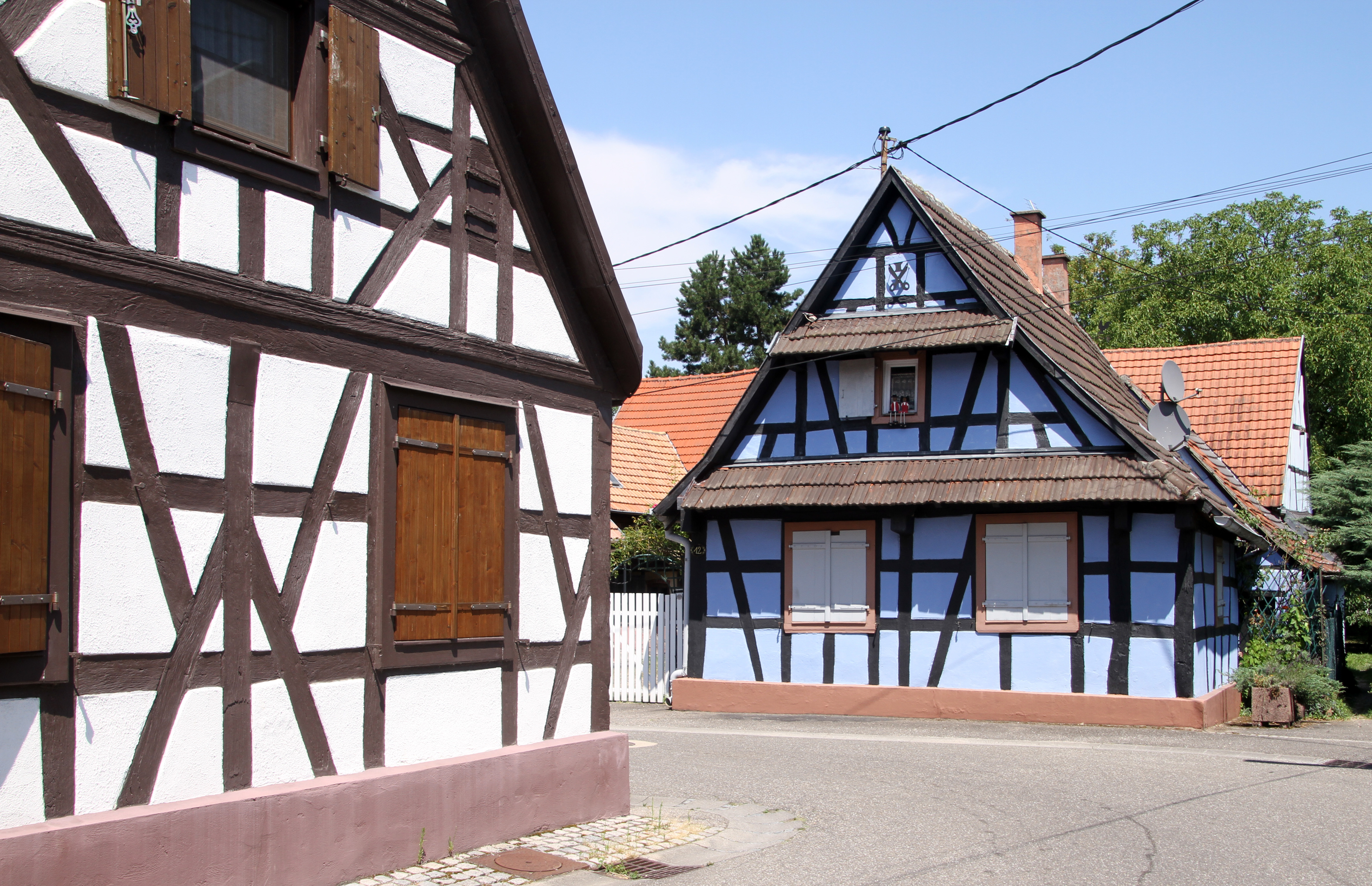 Leutenheim